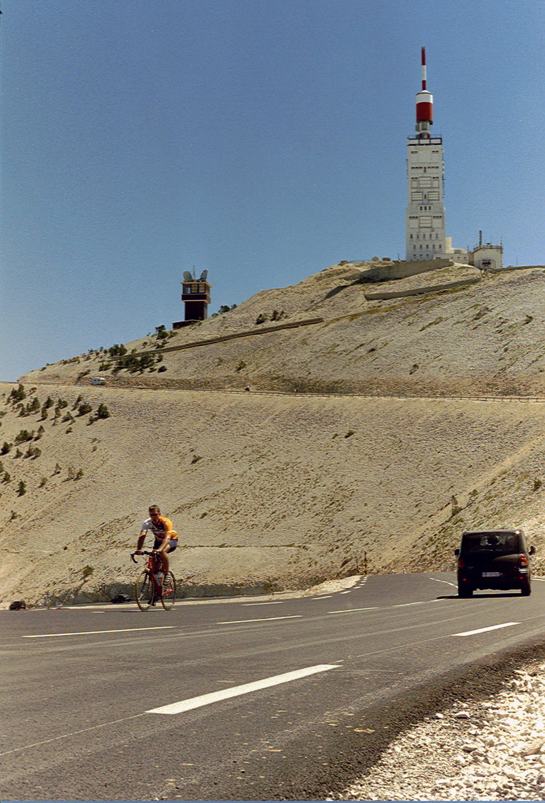 Zelf gemaakt door Niels Bosboom in juli 2003. Op de foto staat het weerstation (niet meer in gebruik) op de top van de Mont Ventoux